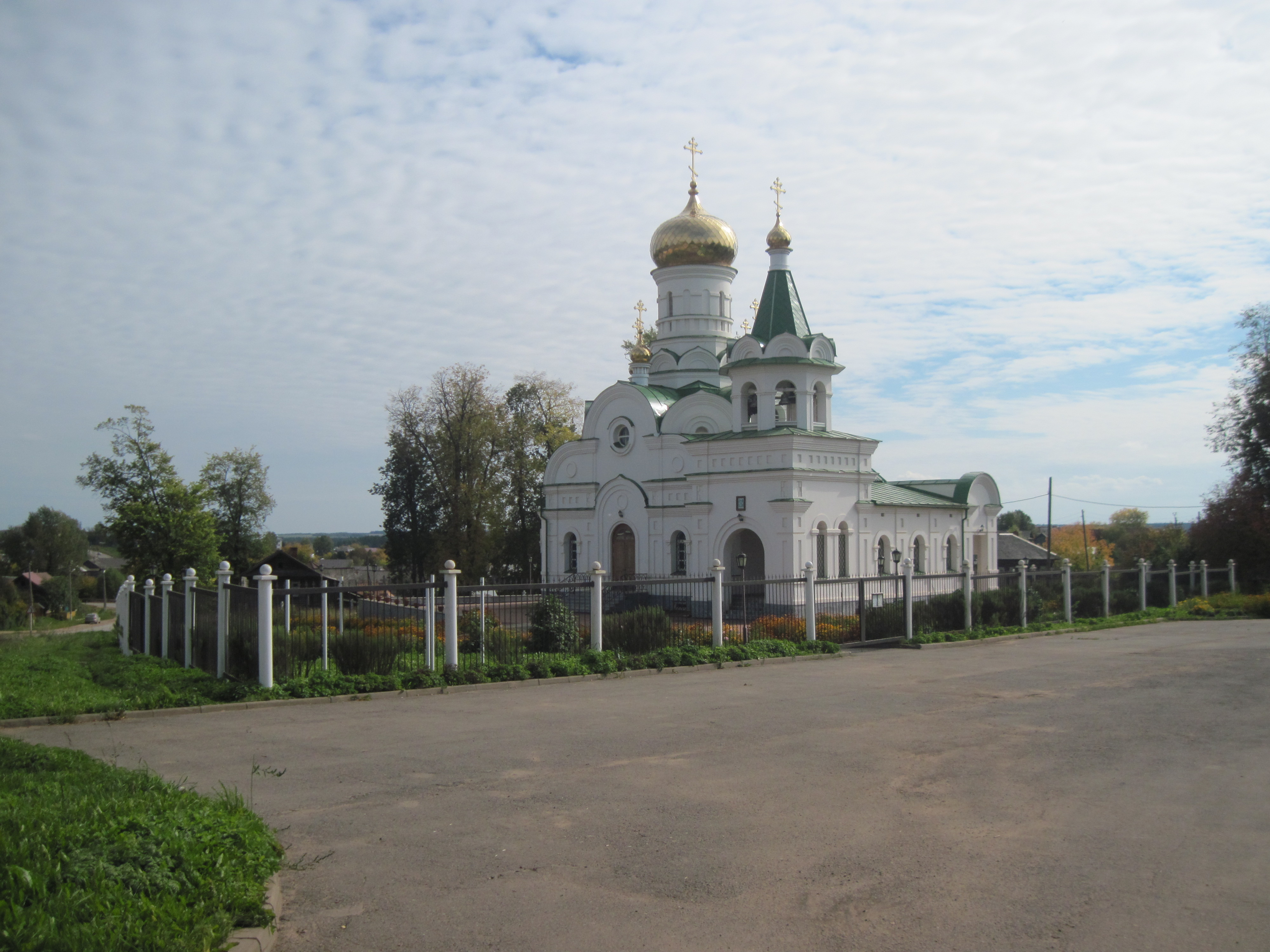 Церковь на улице Советской, построена в 2006 году. Изначально находилась на месте, где сейчас находится здание Администрации.